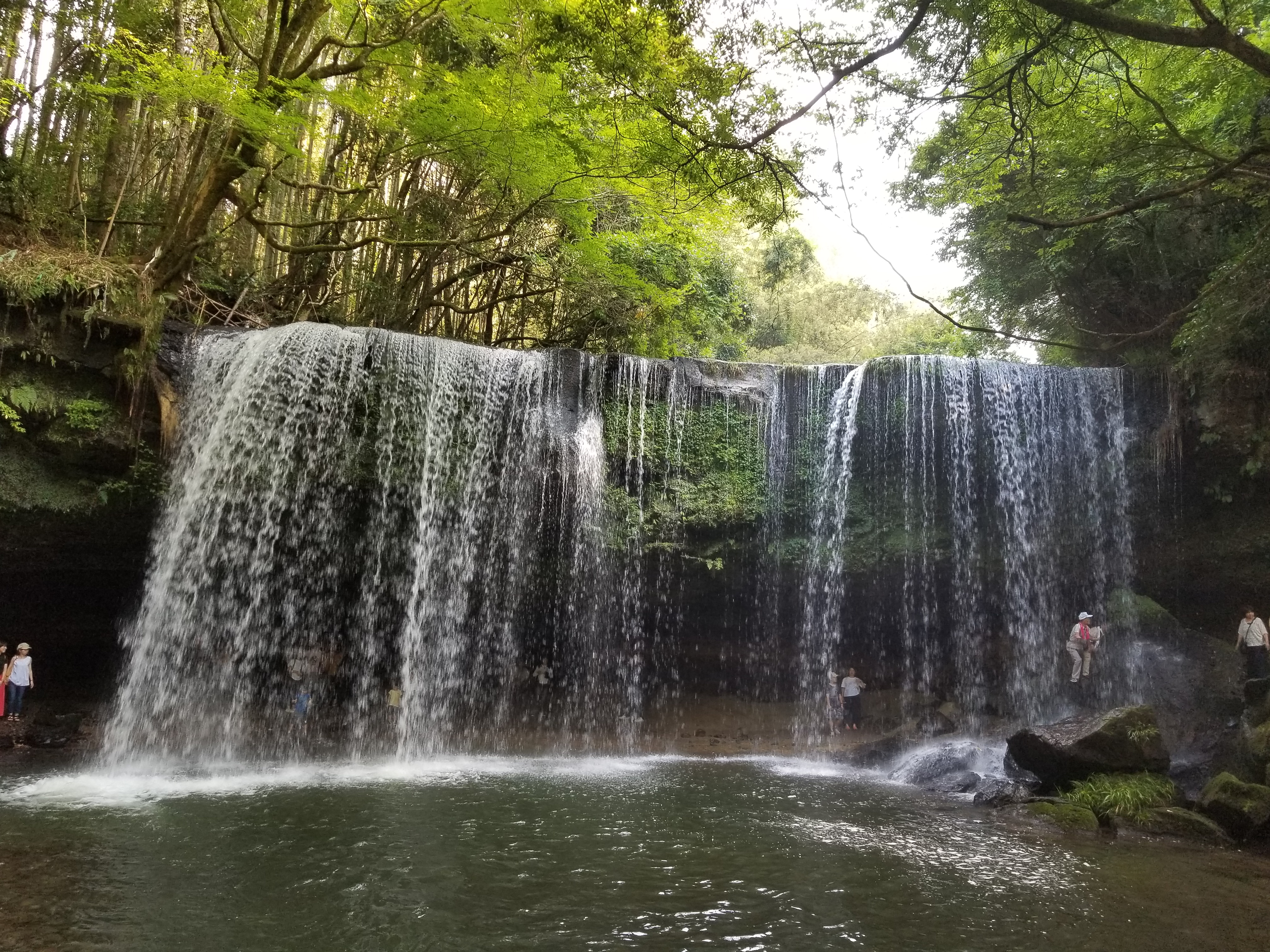 鍋ケ滝(熊本県小国町）